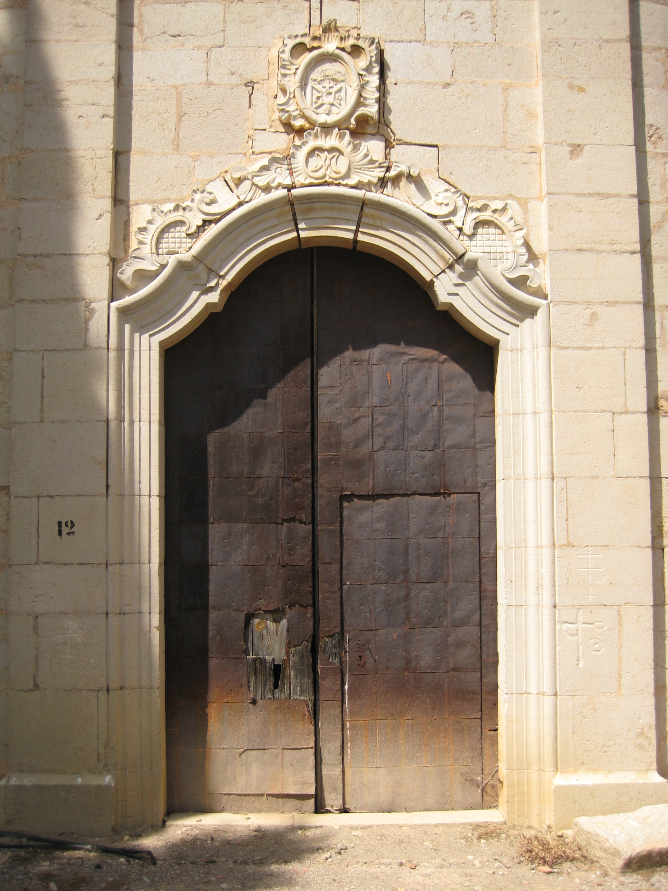 Portada de l'ermita de la Mare de Déu dels Àngels de La Jana (Baix Maestrat)